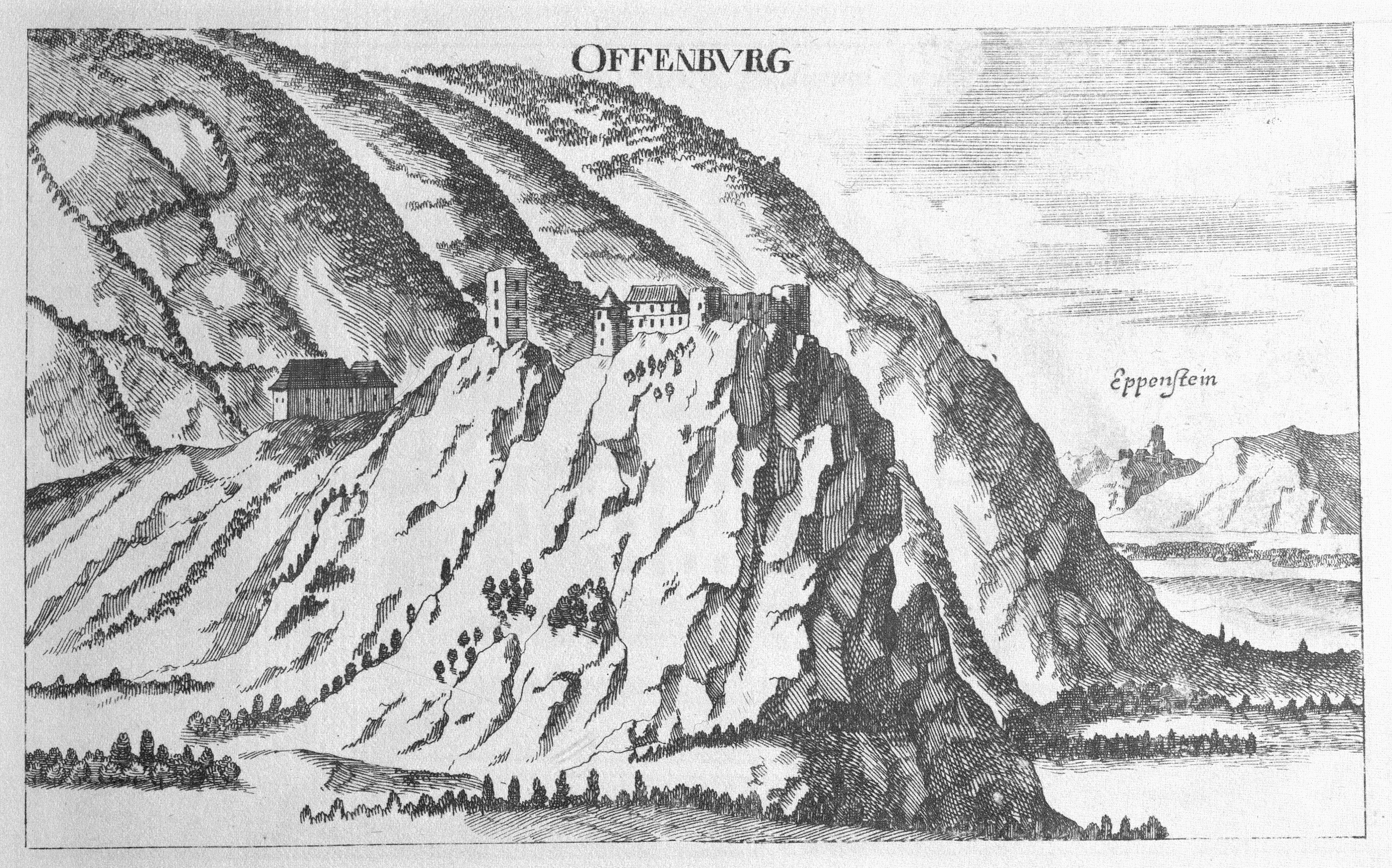 G. M. Vischers Käyserlichen Geographi, Topographia Ducatus Stiriae, Das ist: Eigentliche Delineation / und Abbildung aller Städte / Schlösser / Marcktfleck / Lustgärten / Probsteyen / Stiffter / Clöster und Kirchen / so es sich im Herzogthumb Steyrmarck befinden; Und anjetzo Umb einen billichen Preyß zu finden seynd Bey Johann Bitsch Universitäts Buchhandlern / Auff dem Juden=Platz bey der guldenen Saulen. Graz 1681 Die Nummerierung der Dateien folgt der alphabetischen Reihung der Ortsnamen und entspricht nicht dem Vischer-Register